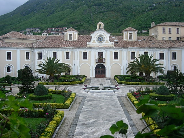 Mercogliano (Avellino), Campania, Italy